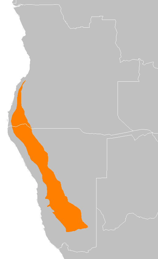 Namibian savanna woodlands ecoregion map